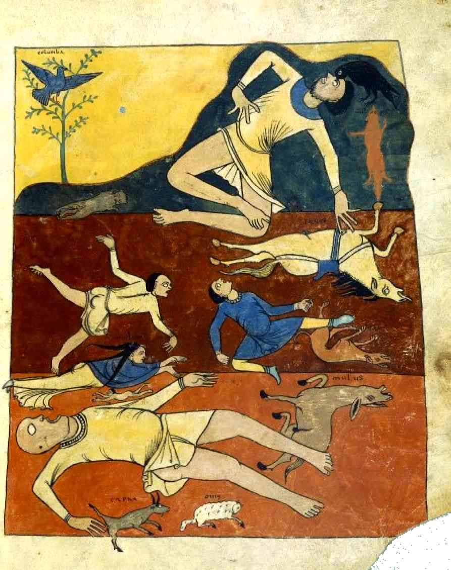 Apokalypse von Saint-Sever, f.85r, Deluge